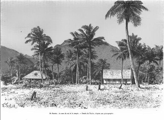 Ile Rurutu, la case du roi et le temple. Dessin de Taylor, d'après une photographie.